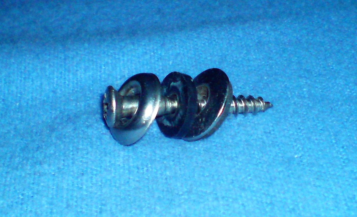 Spenglerschraube, 35 x 4,5 mm mit Tellerscheibe, Dichtung und Dichtungsscheibe